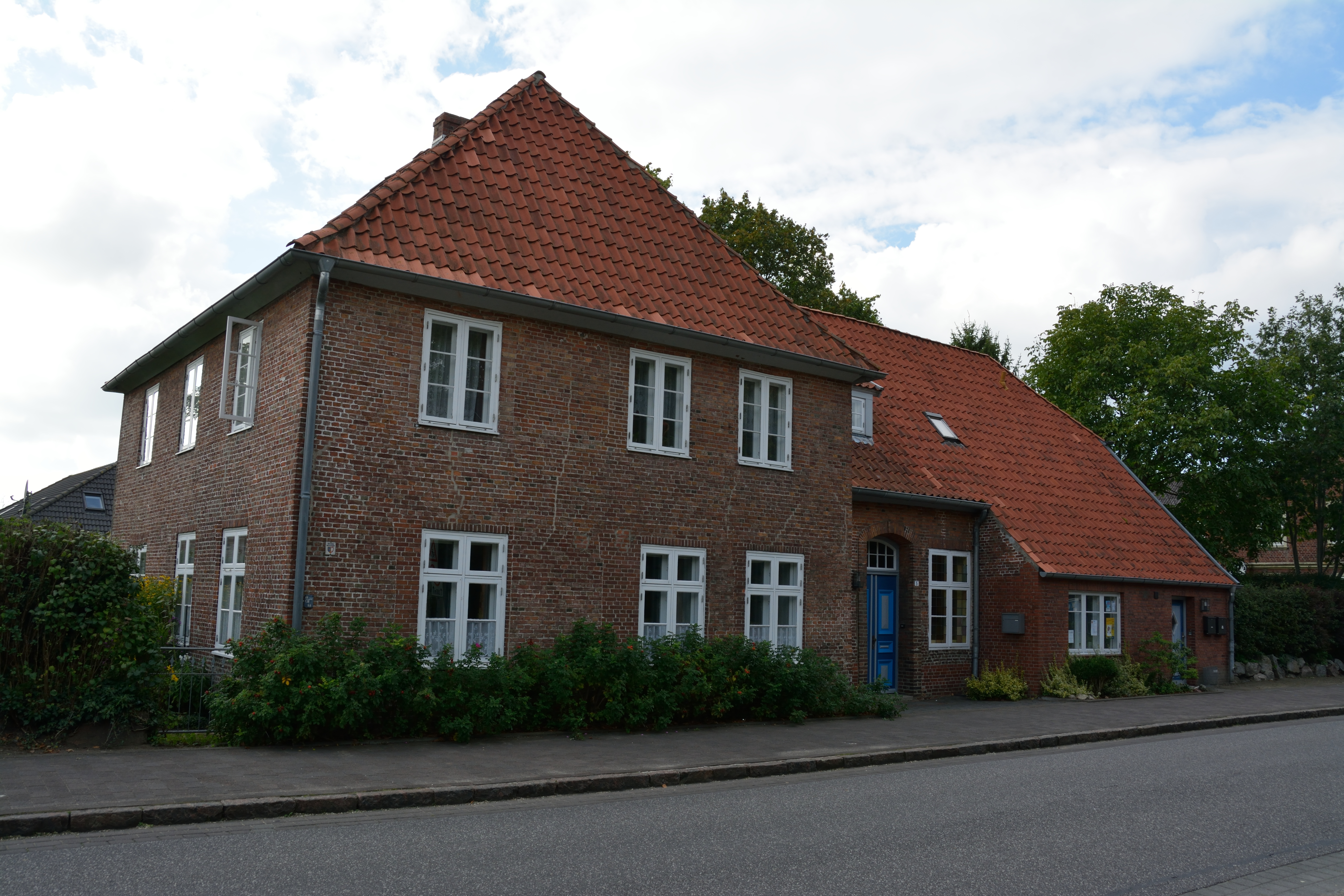 Pastorat neben der Kirche